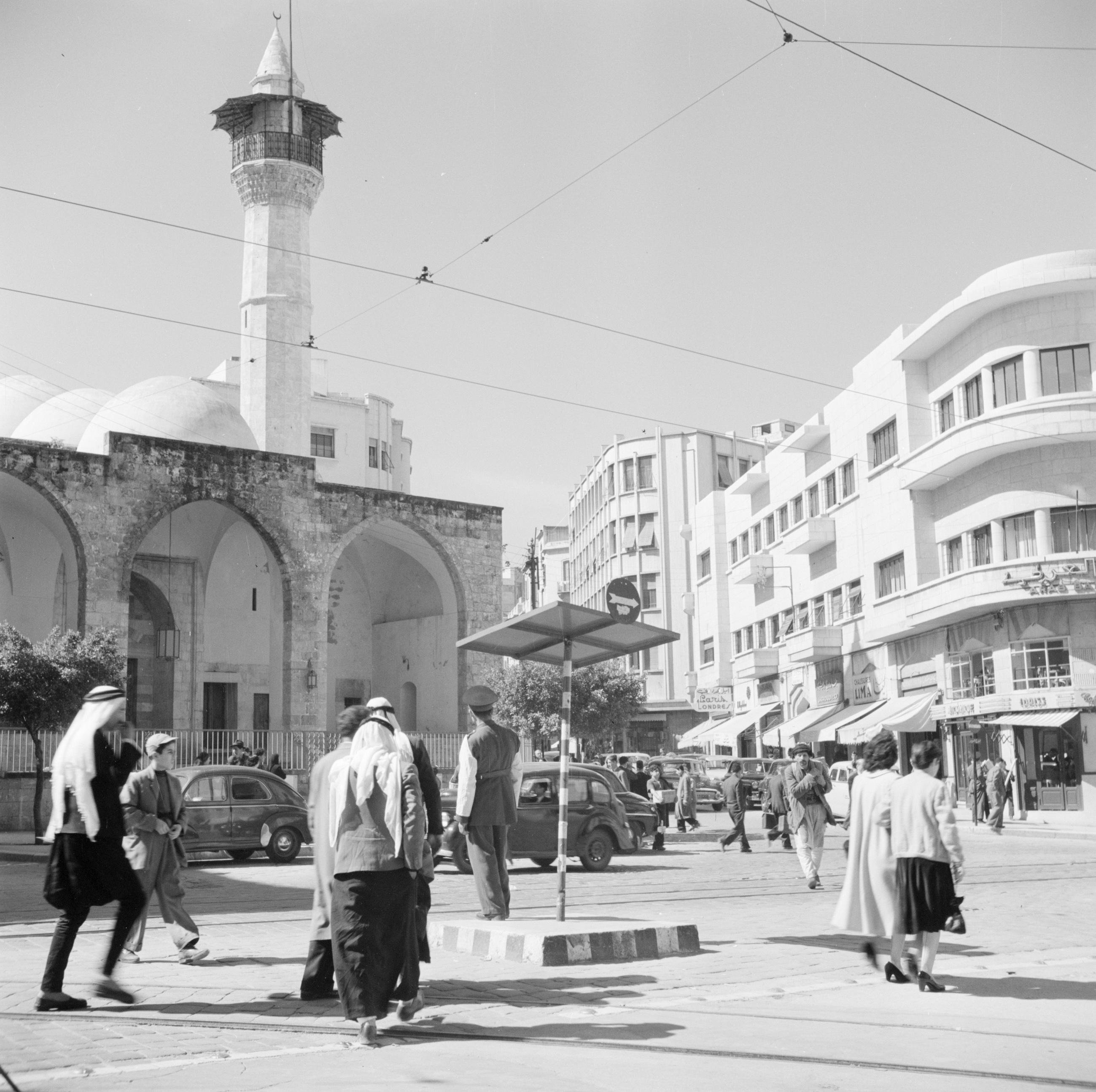 Collectie / Archief : Fotocollectie Van de Poll Reportage / Serie : Midden-Oosten 1950-1955: Libanon Beschrijving : Straatbeeld in Beiroet Annotatie : Moskee aan de Weygand straat Datum : 1950 Locatie : Beiroet, Libanon Trefwoorden : auto's, straatbeelden, verkeersagenten, voetgangers Fotograaf : Poll, Willem van de Auteursrechthebbende : Nationaal Archief Materiaalsoort : Negatief (zwart/wit) Nummer archiefinventaris : bekijk toegang 2.24.14.02 Bestanddeelnummer : 255-6189